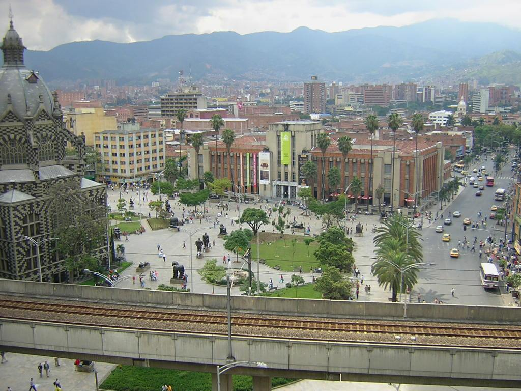 Plaza Botero y Museo de antioquia, Medellín, Colombia